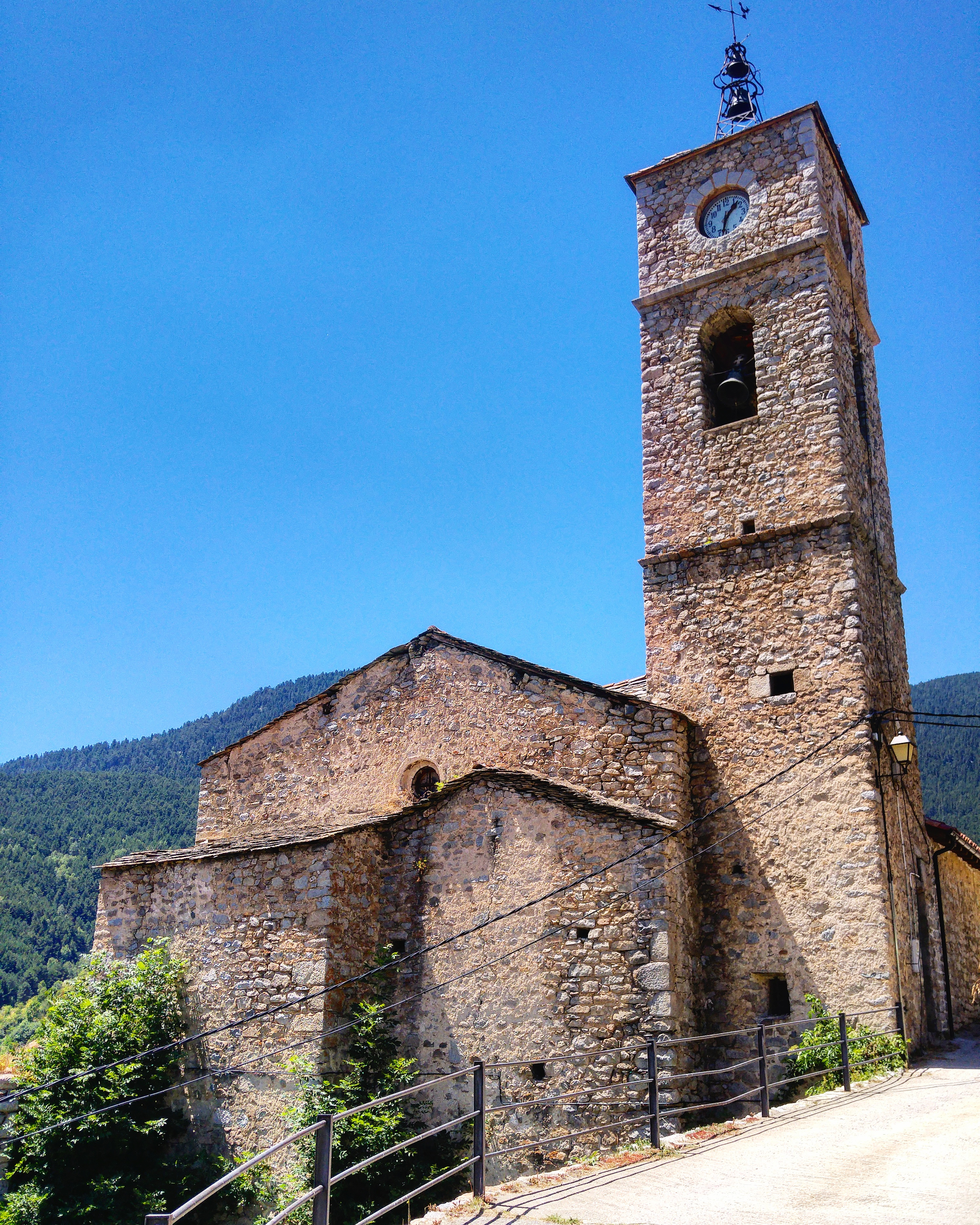 Sant Martí d'Arànser (doc. 839) a Arànser, Lles de Cerdanya, Baixa Cerdanya